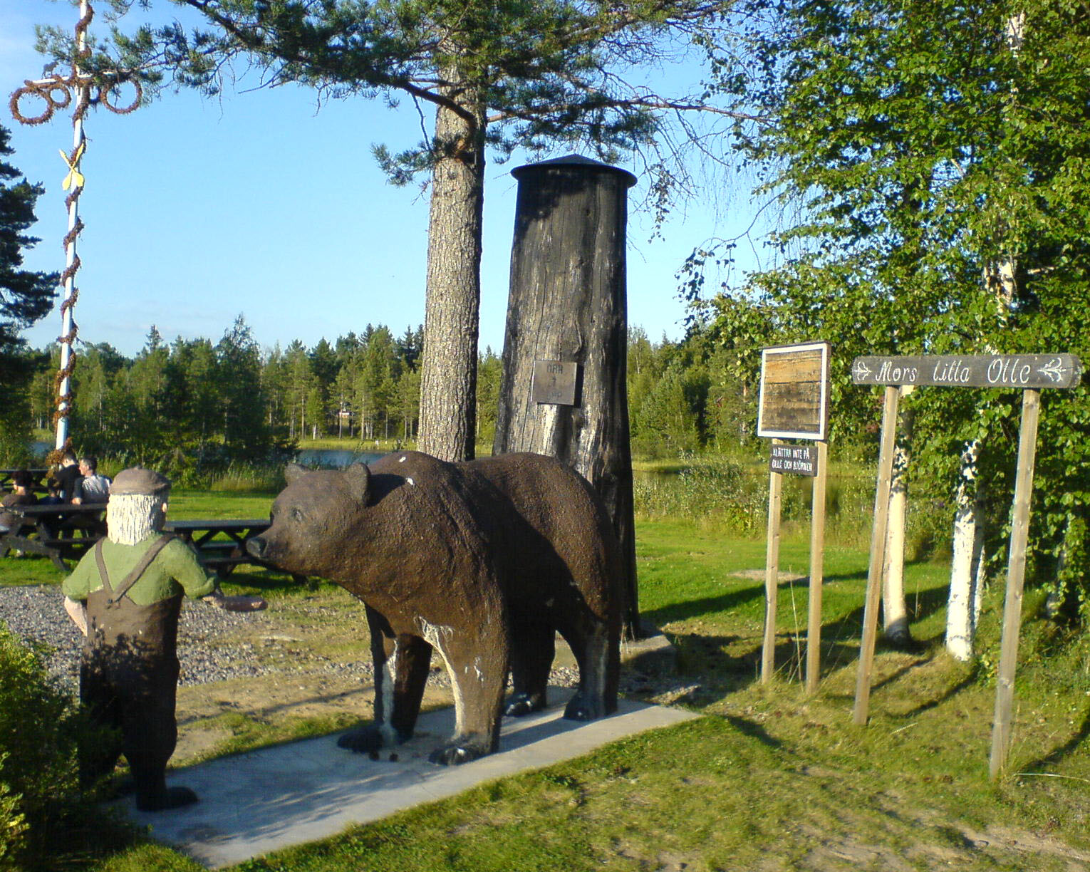 En träskulptur som föreställer barnvisan "Mors lilla Olle" utanför Särna i Dalarna.